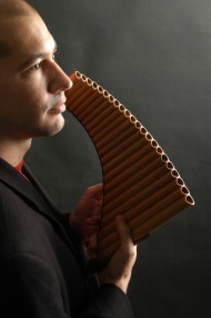 Portrait von Michael Dinner, Panflötist